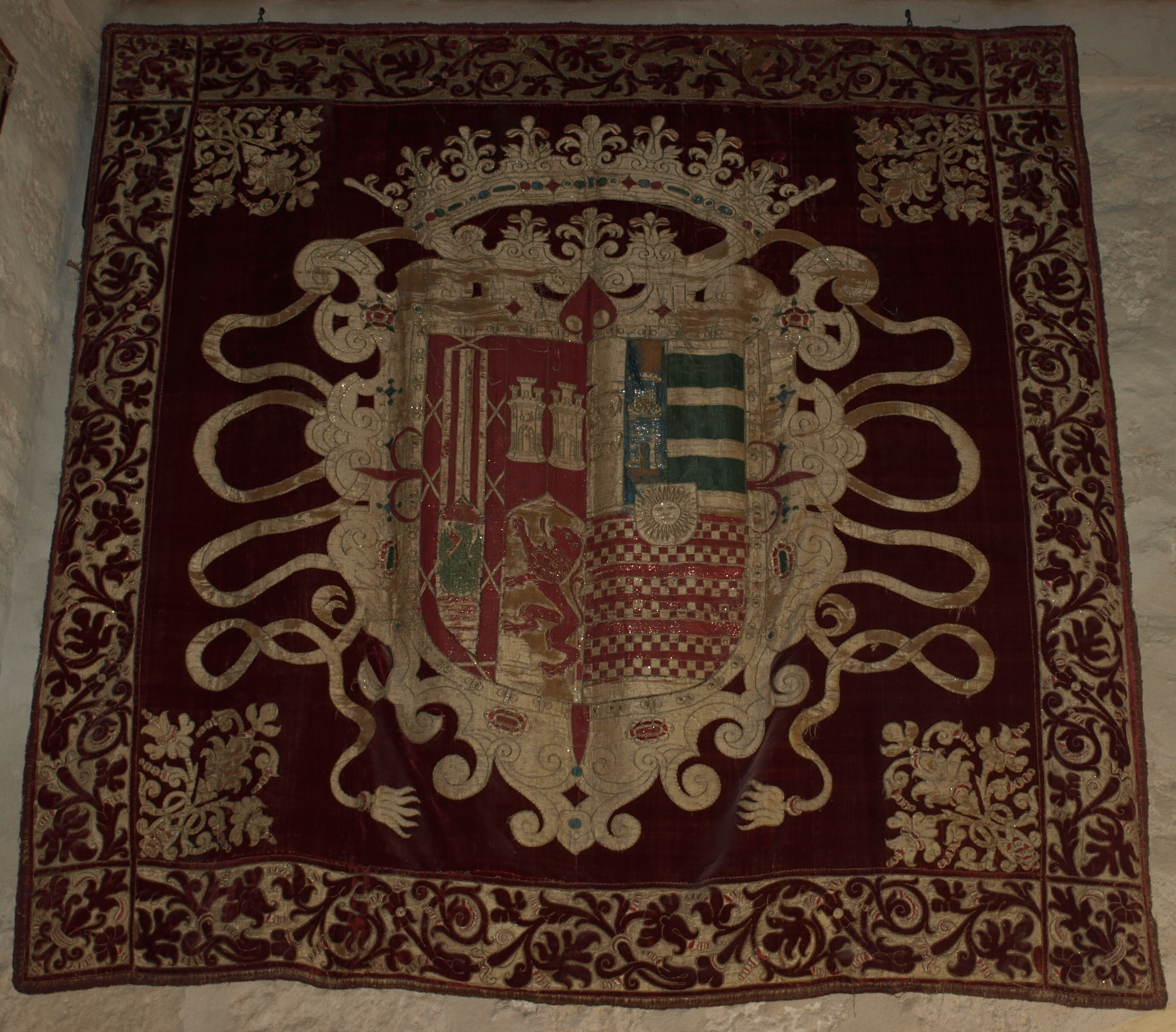 Repostero del siglo XVII perteneciente a la Casa de Alburquerque que se conserva en el castillo de Cuéllar (Segovia). Perteneció al VIII duque, Virrey de Nueva España, y a su mujer, la marquesa de Cadreita.